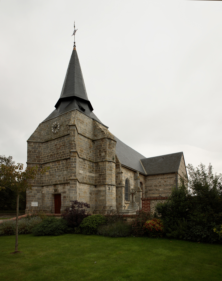 Eglise .